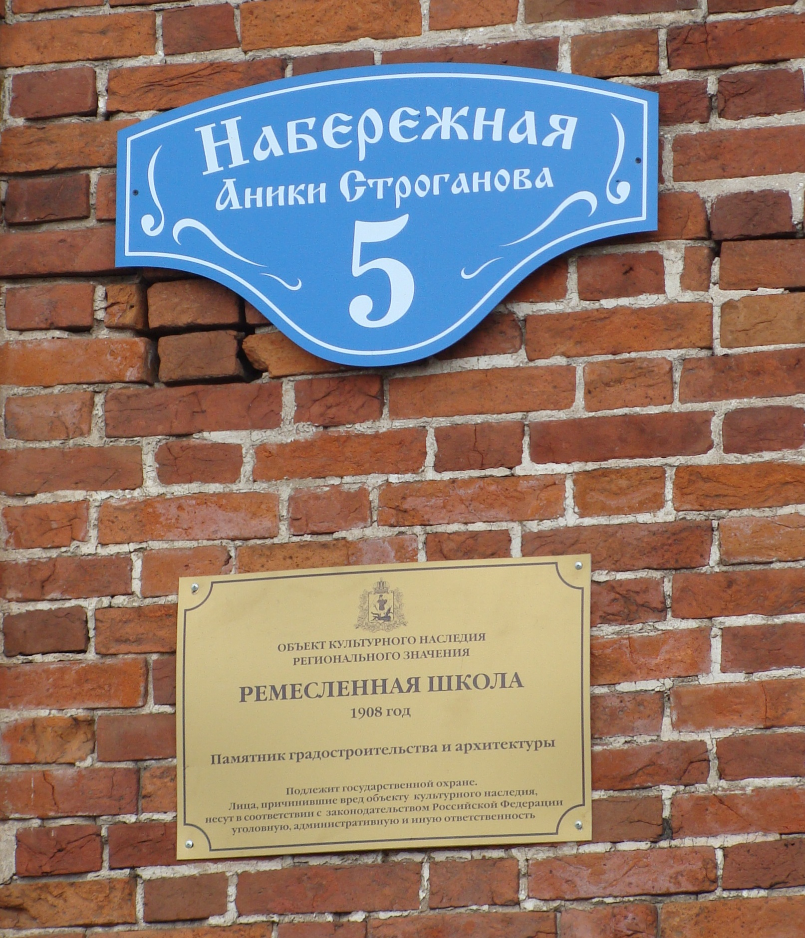 Аншлаг. Сольвычегодск